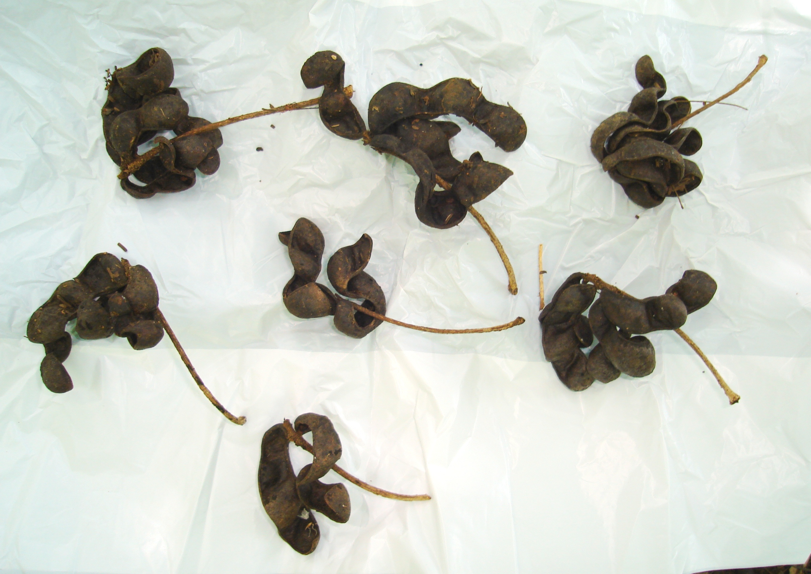 Dichrostachys cinerea, planta invasora e indeseable (weed), legumbres secas caídas, fotografiada en Pinar del Río, Cuba.